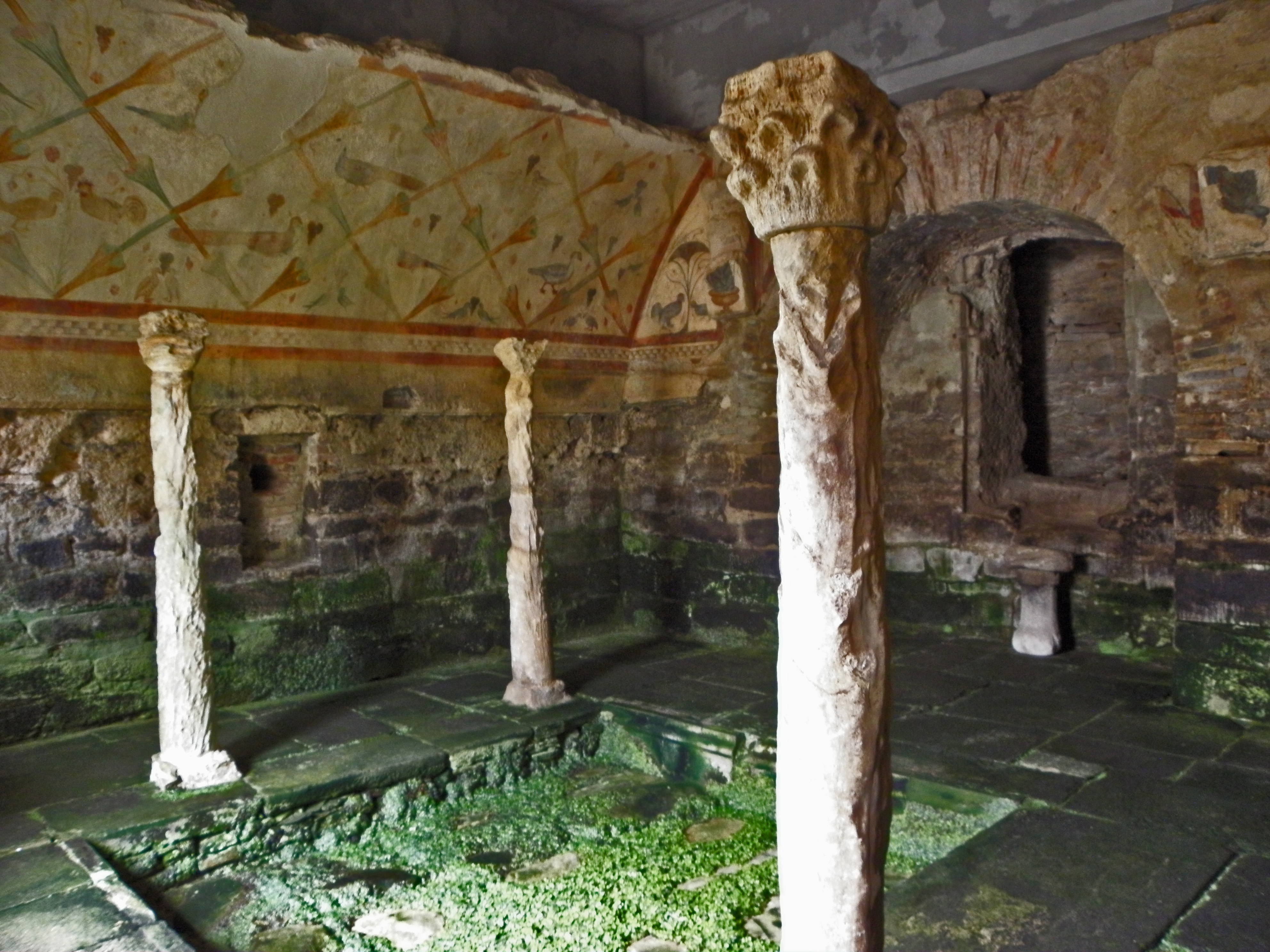 Fase/Estilo: Visigodo/Romano-Suévico Época: Siglos IV-V Situación: Sta. Eulalia de Bóveda (Lugo)